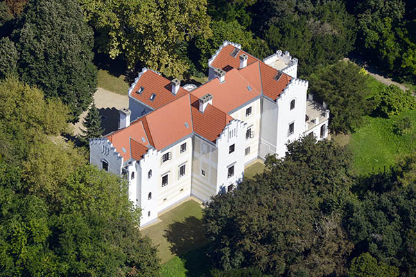 Bezerédi-kastély, Zsennye